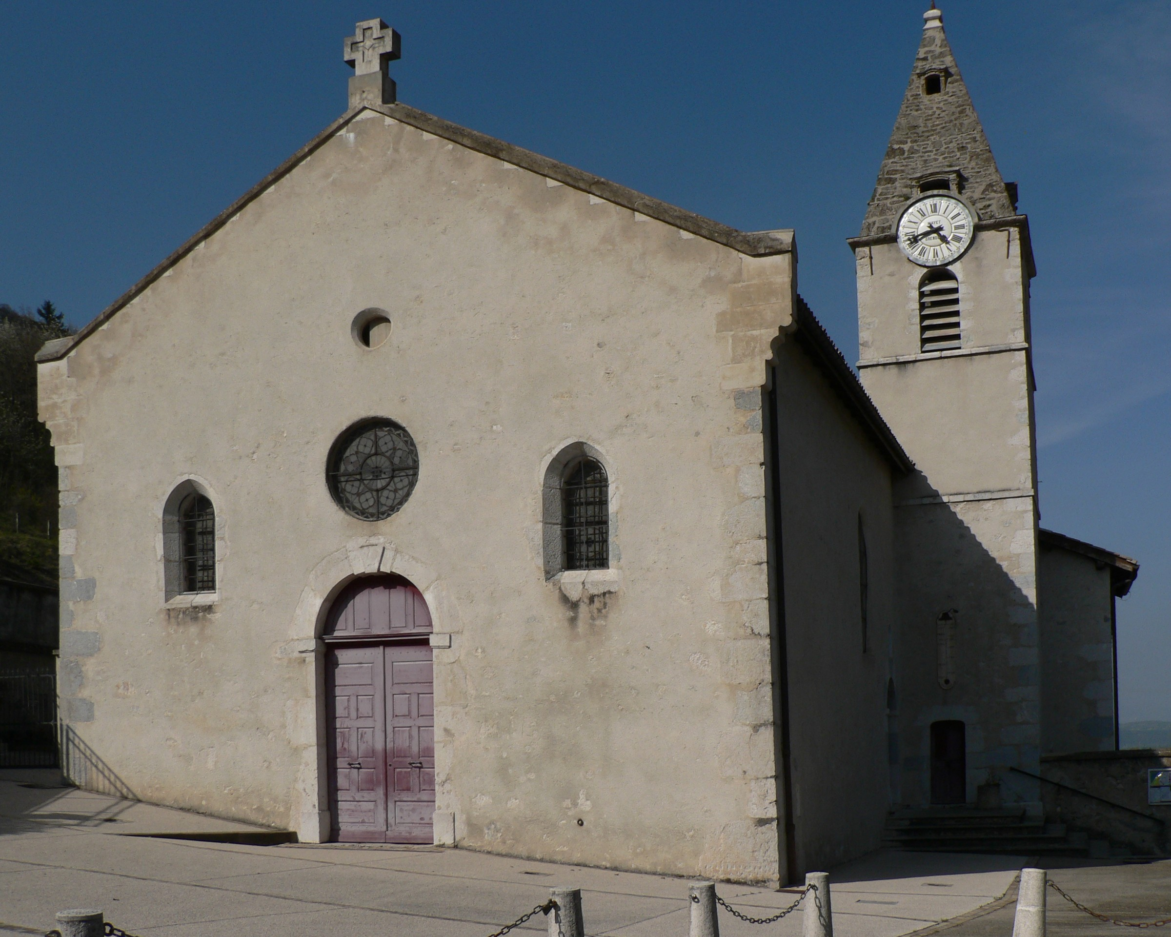 L'église du Gua